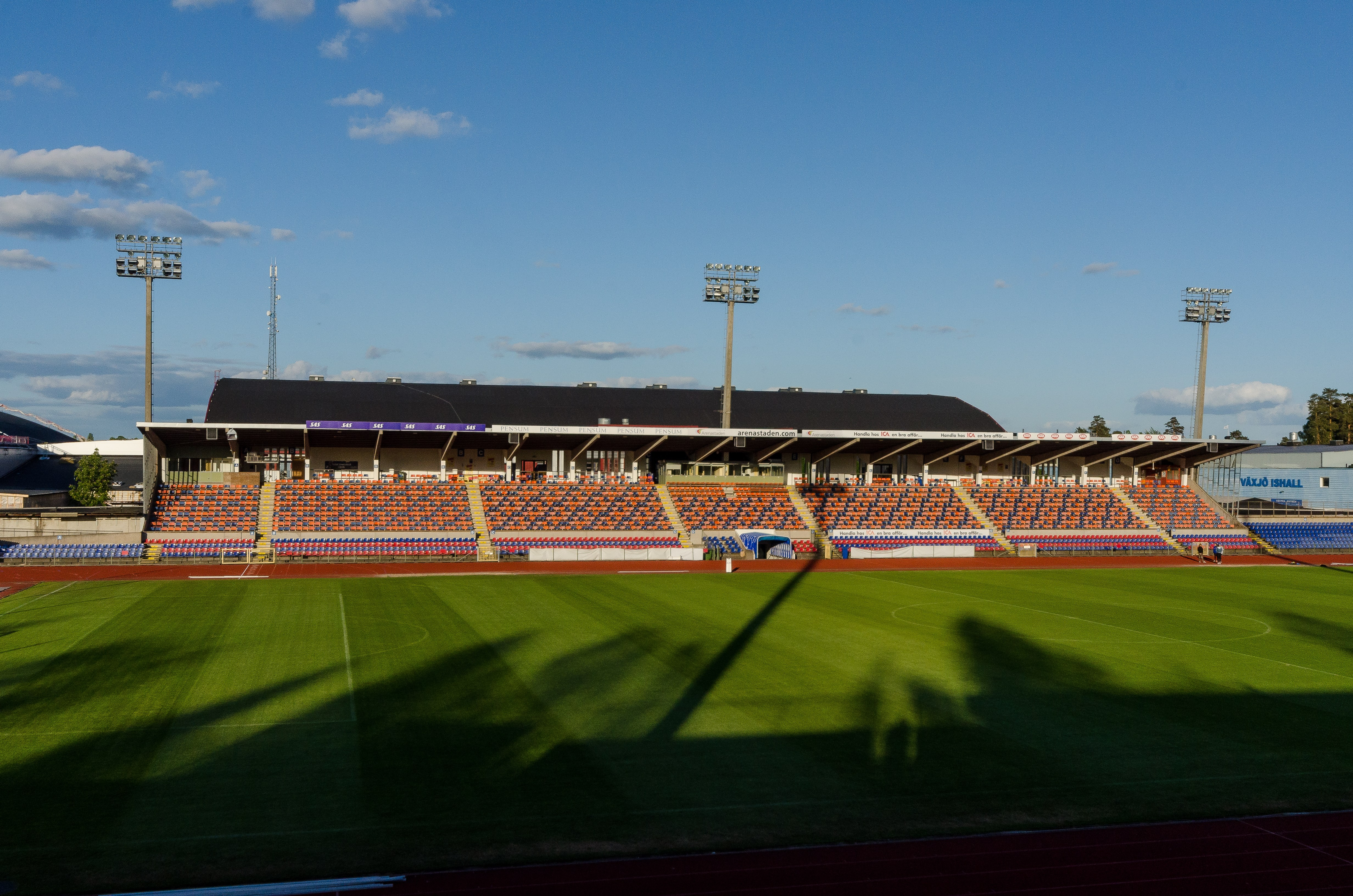 Värendsvallens huvudläktare i juni 2012. I bildens yttersta vänstra kant skymtar bygget av Telekonsult Arena, bakom läktaren kikar Växjö Tipshall upp och ute till höger syns Växjö Ishall.